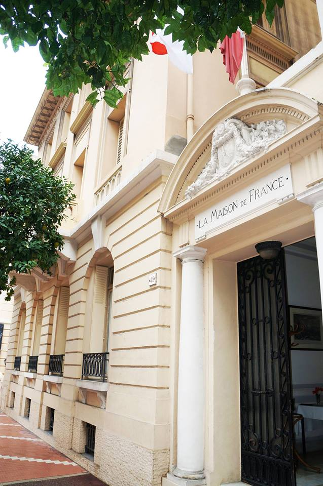 Façade du bâtiment de la Maison de France à Monaco